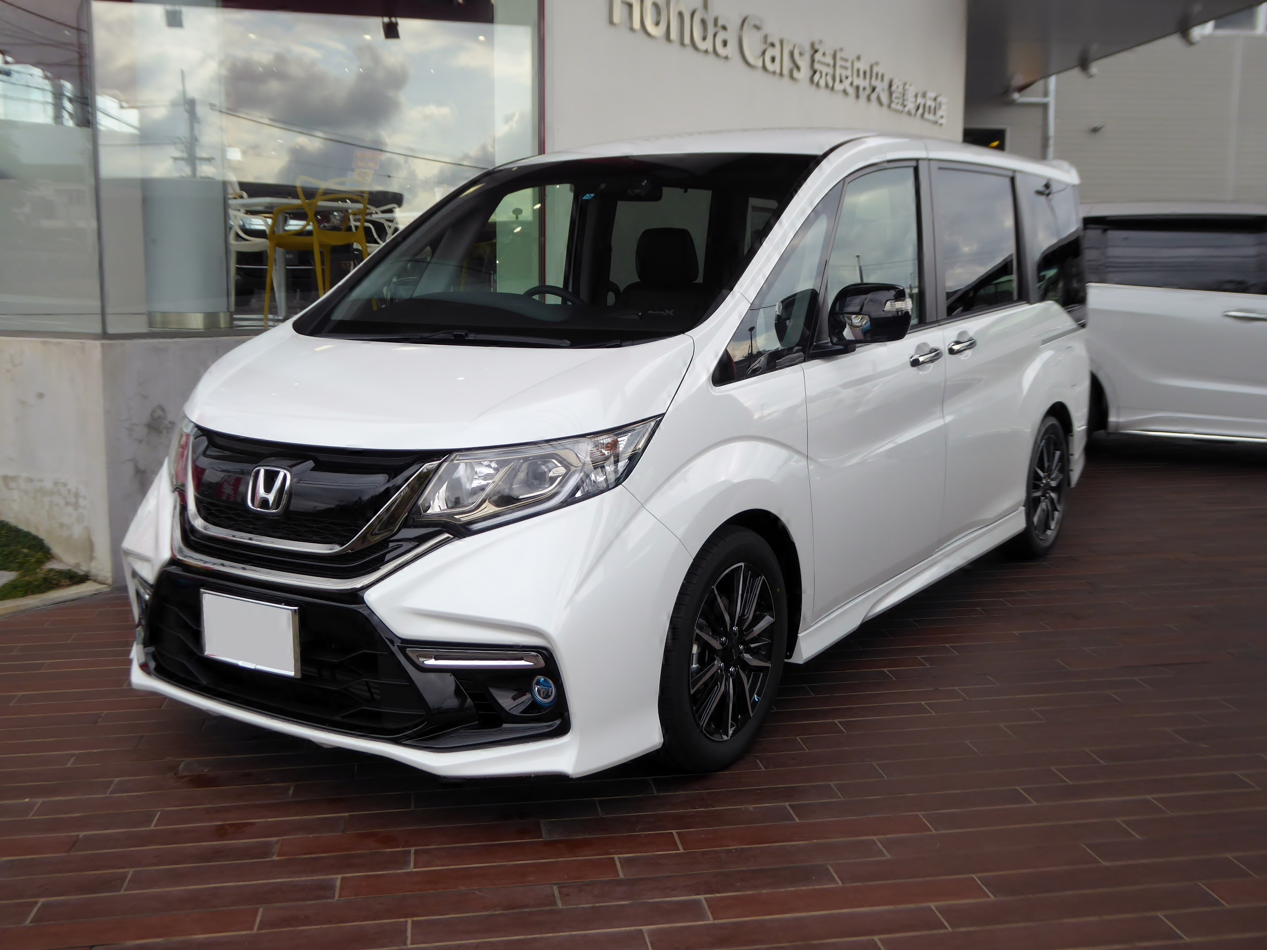 DBA-RP3型ホンダ・ステップワゴンモデューロXを撮影。